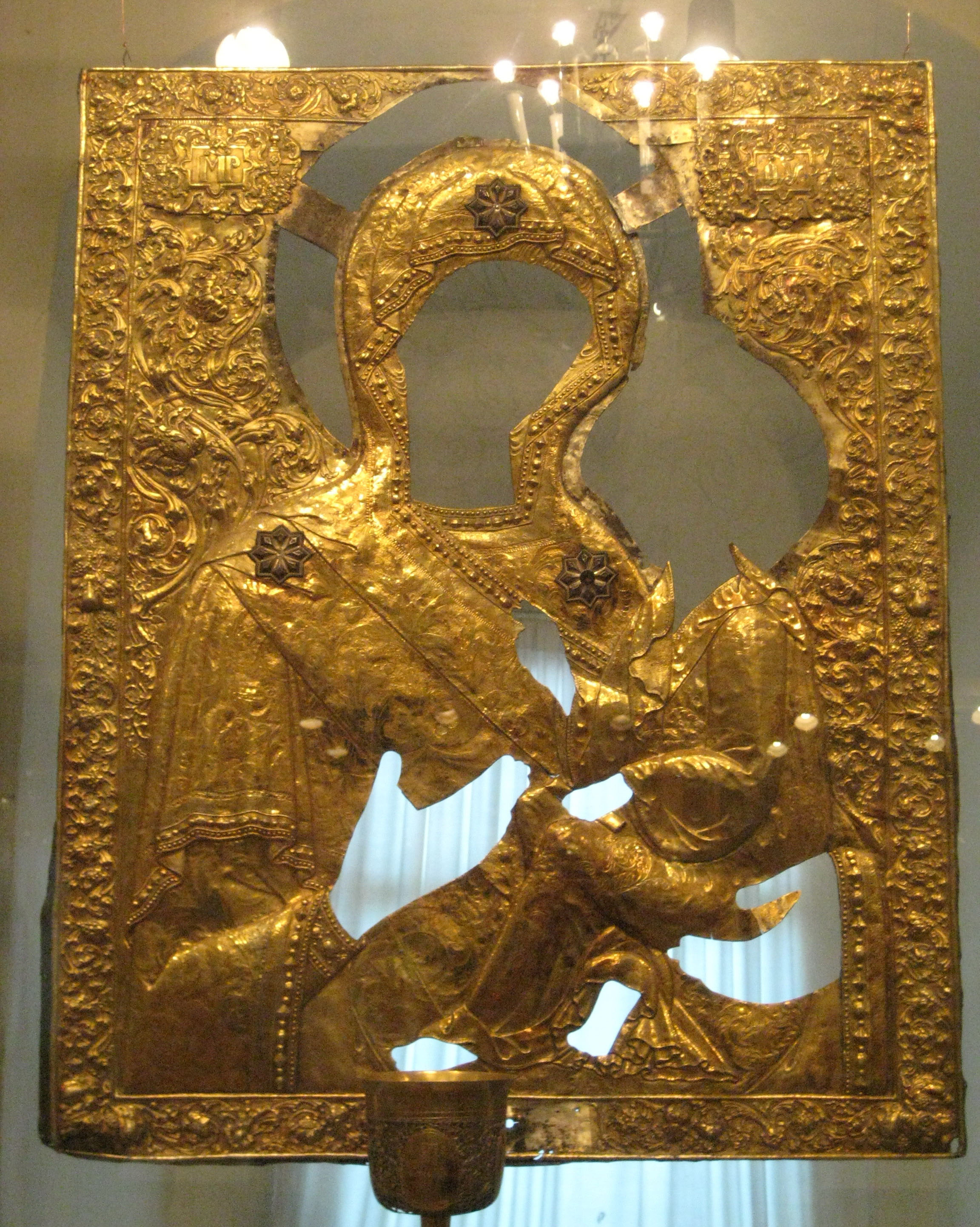 Riza of Our Lady of Tikhvin icon. Оклад иконы Тихвинской божьей матери. Псковский музей, 18 в.